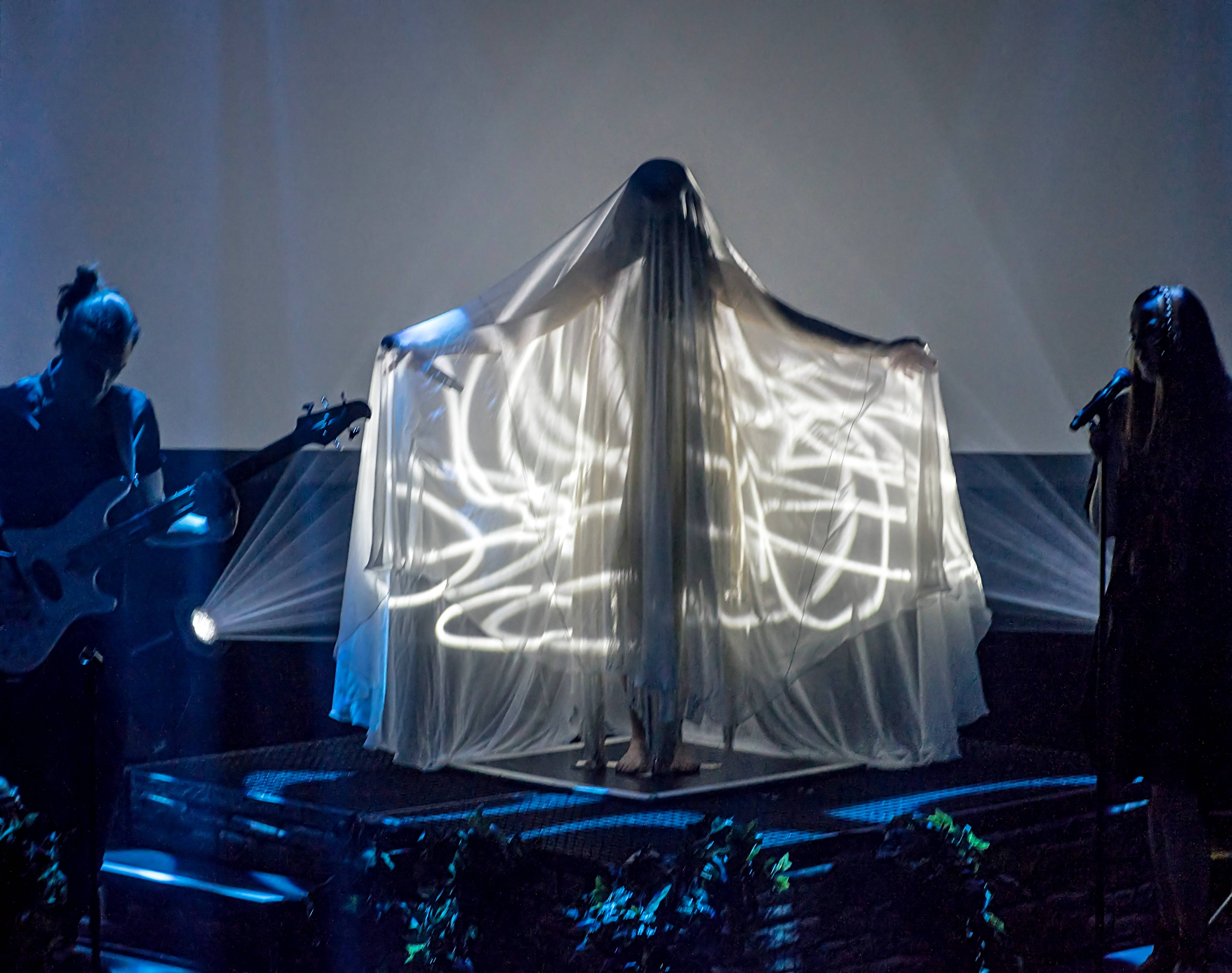 Konzertbilder aus Freiburg im Breisgau Das Konzert der Gruppe Oonagh am 30.04.2015 im Freiburger Paulussaal